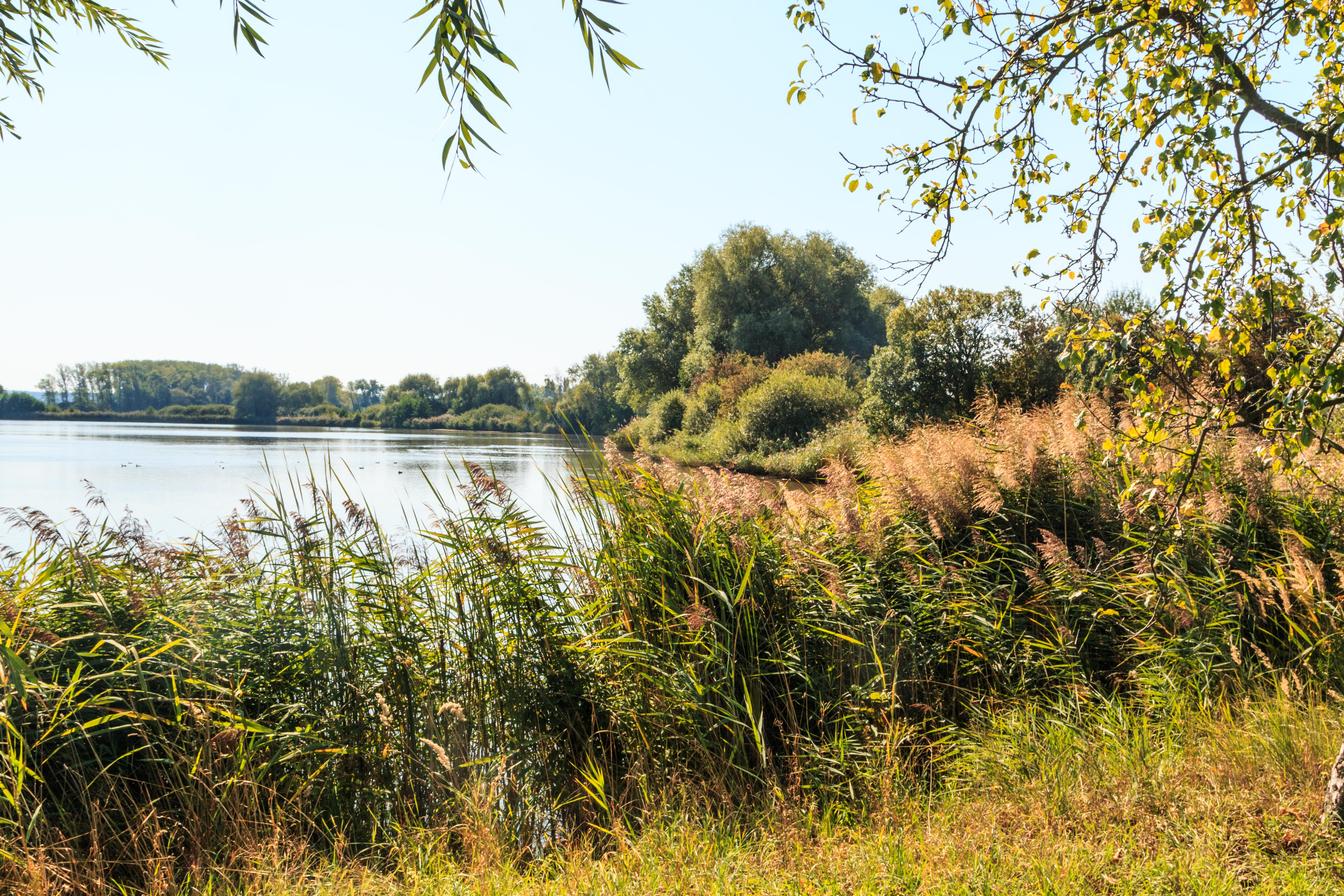 Kosořický rybník